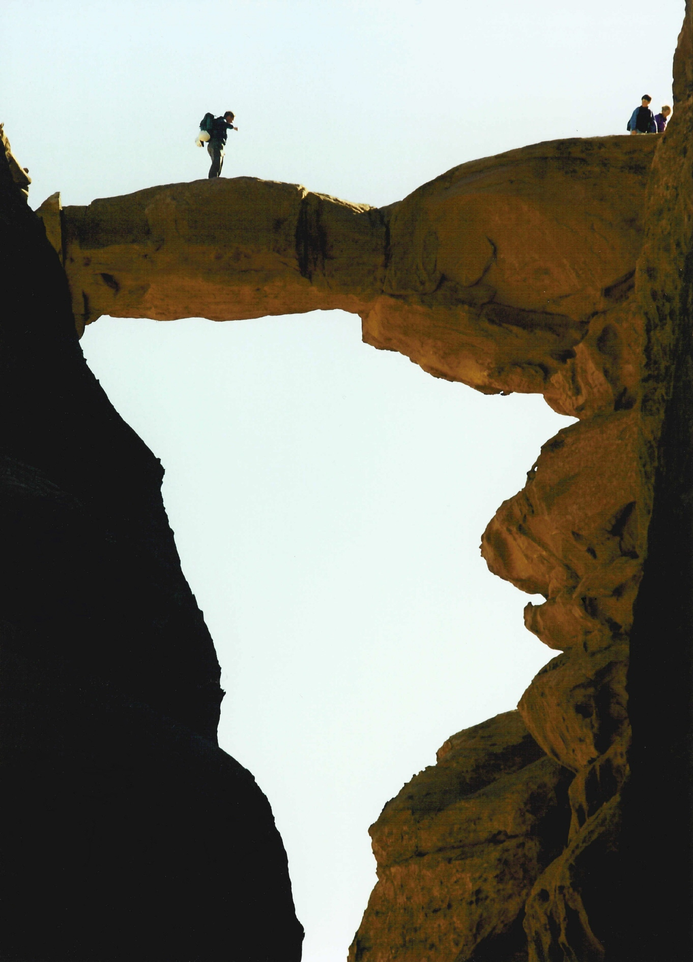 Wadi Rum bridge